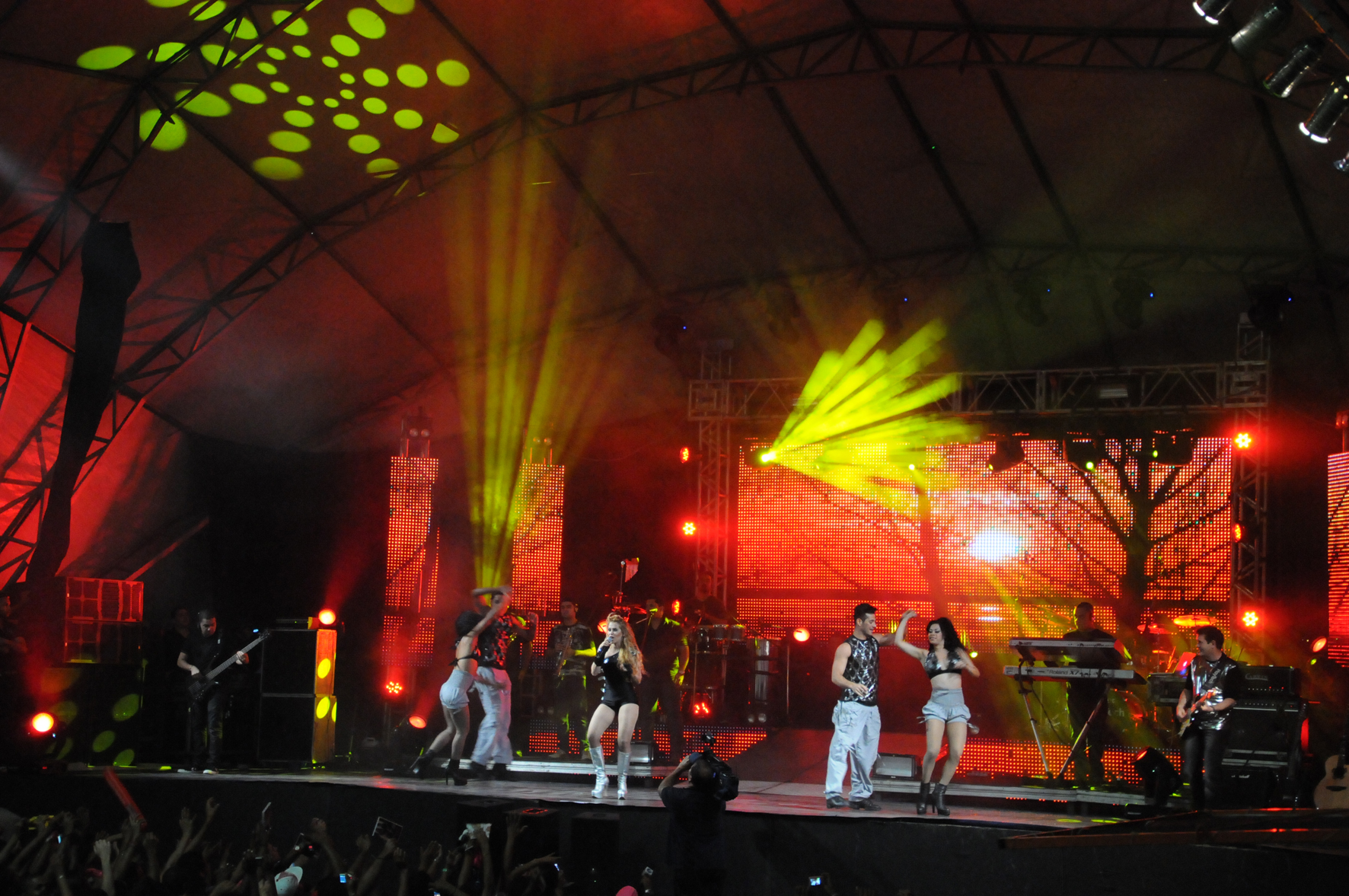 Show da Emancipação com a Banda Calypso.